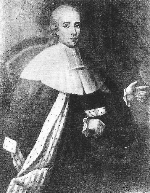 Albert de Bérulle, Premier président au parlement du Dauphiné lors de la journée des tuiles à Grenoble en 1788.